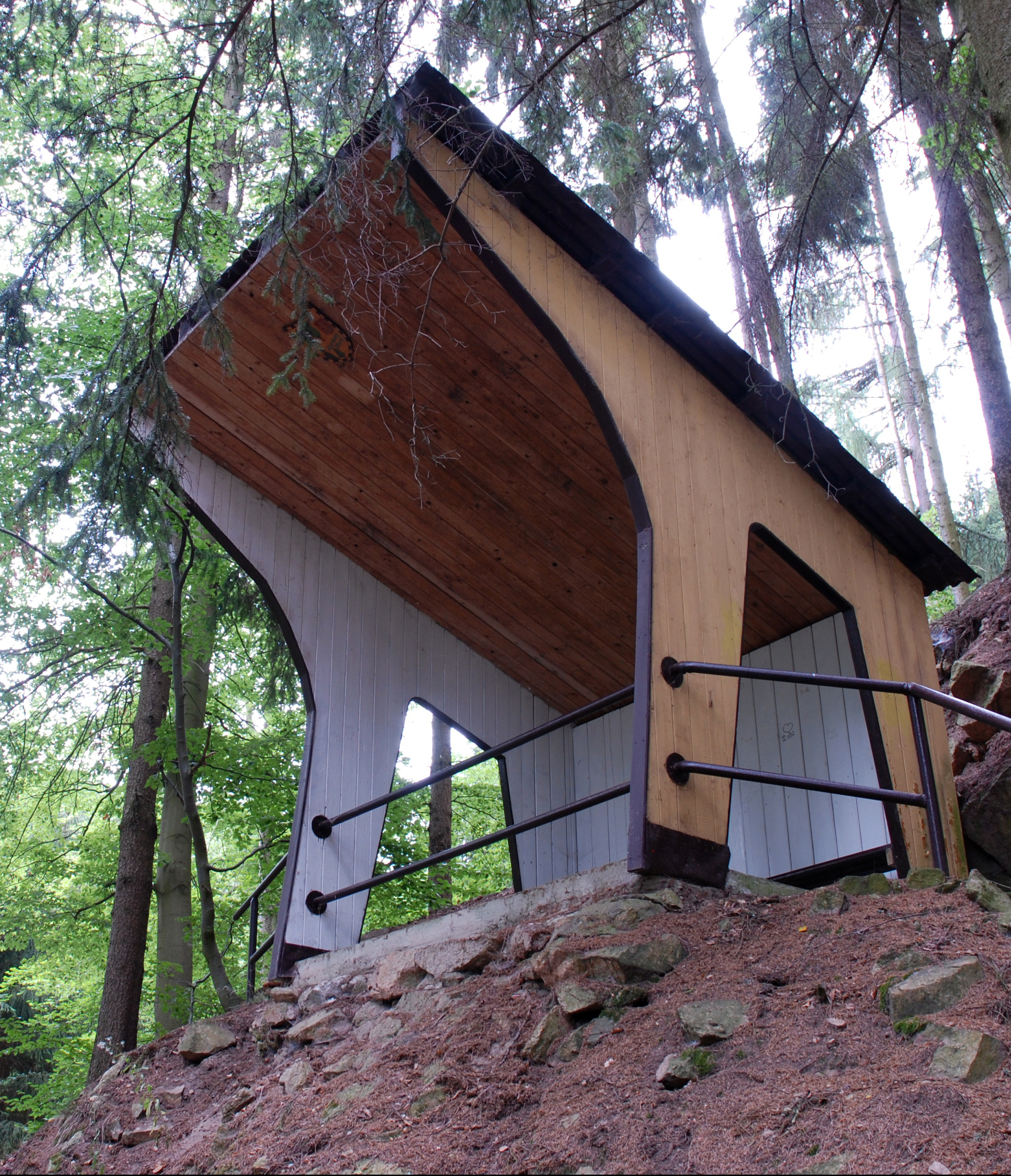 Libušina chata při Beethovenově cestě v karlovarských lázeňských lesích